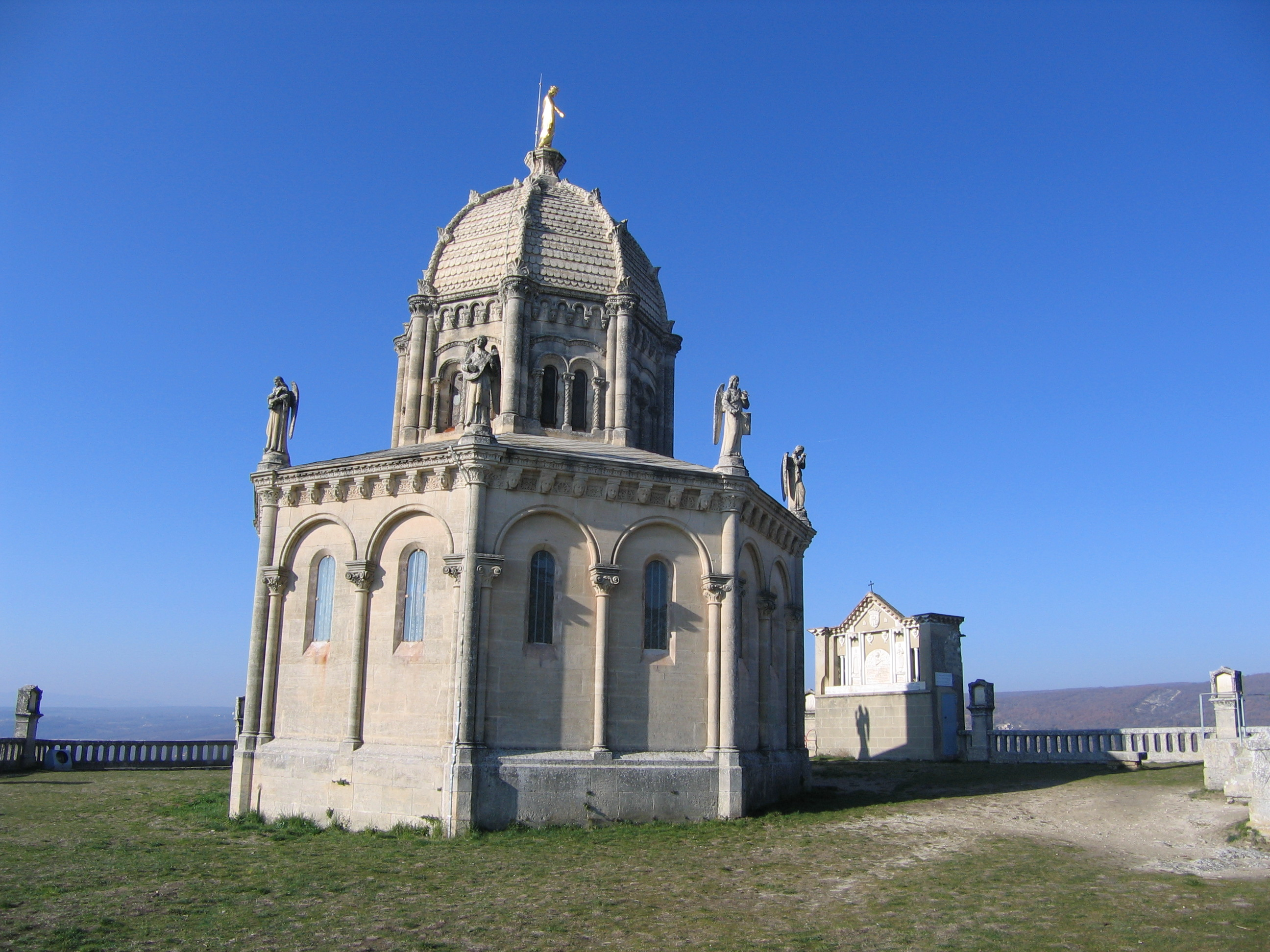 Citadelle Notre Dame de Provence et son carillon (Forcalquier)